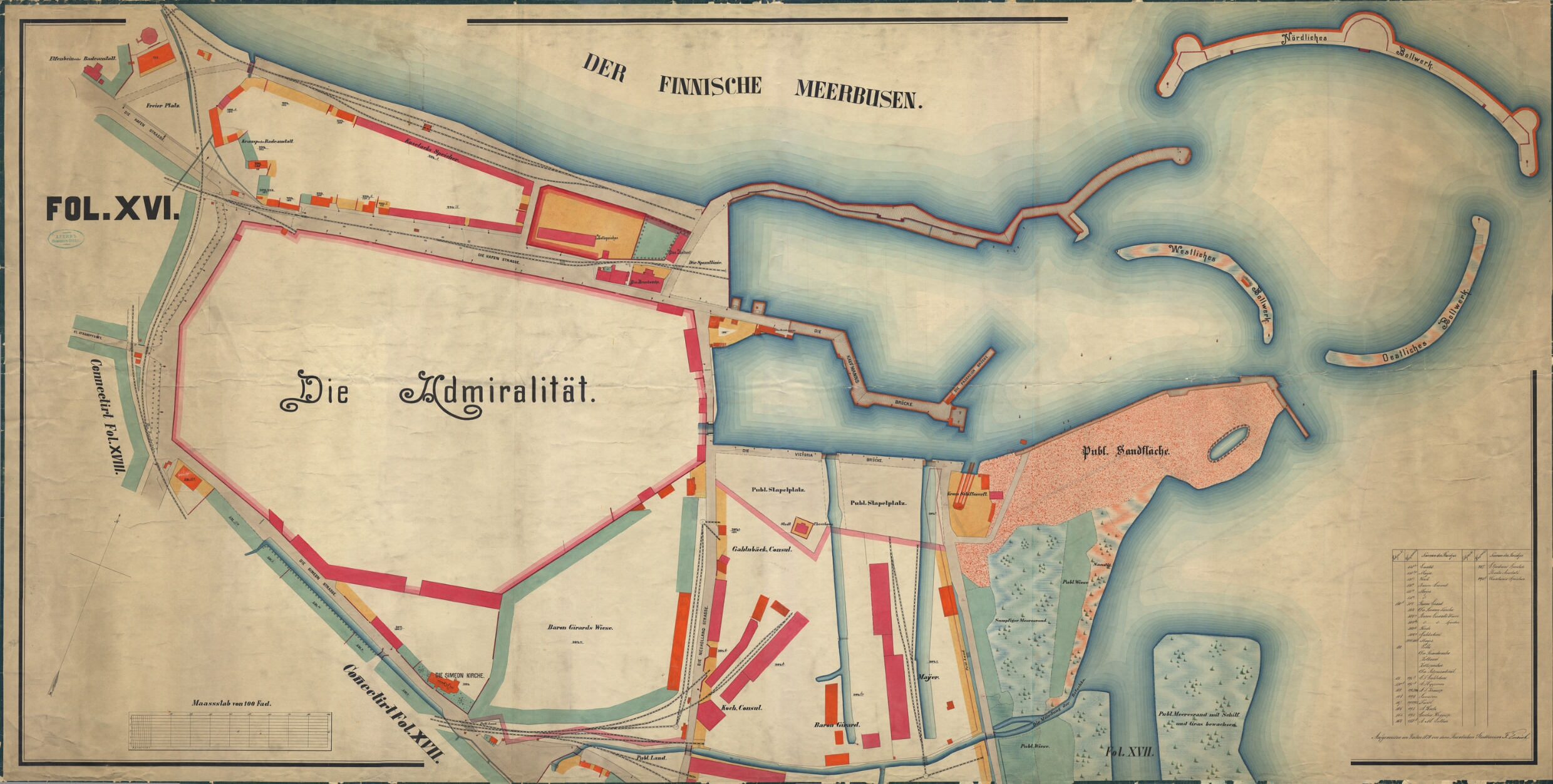 Fol XVI Von de Hafen bis zur Simeon, Neuholland Strasse. Der Hafen und die publ. Plätze